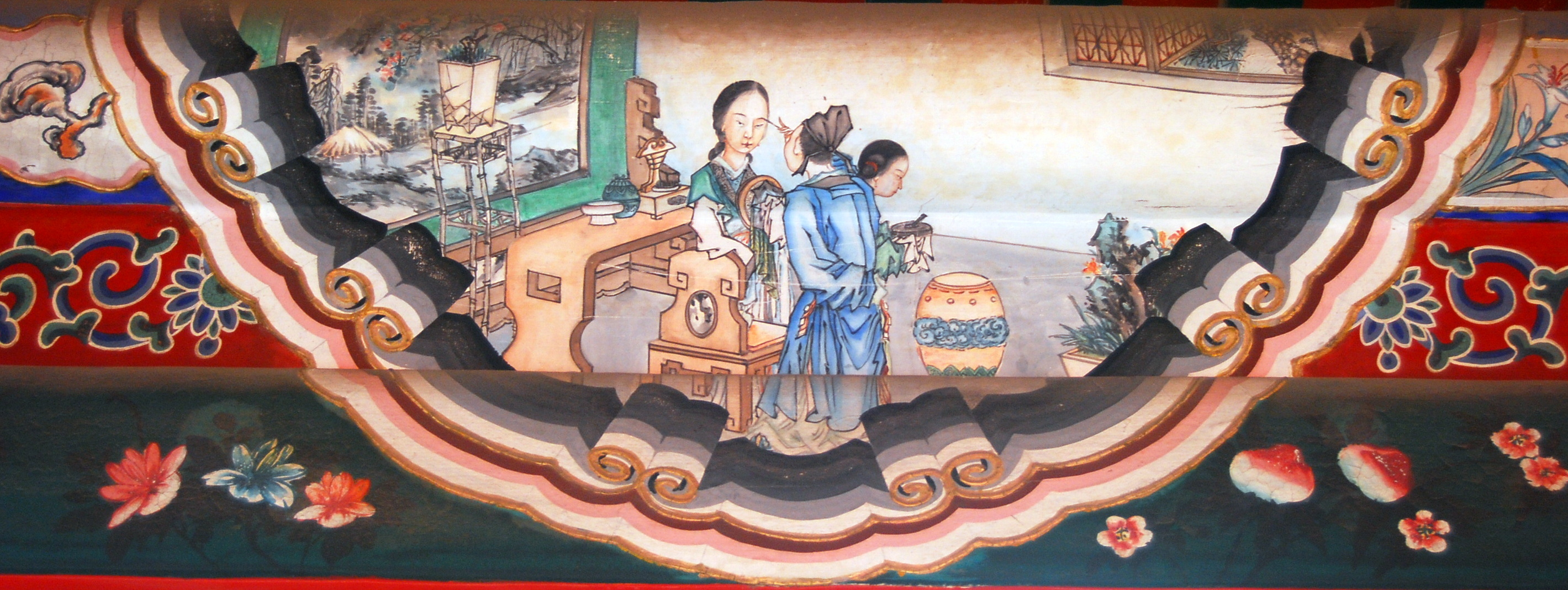 颐和园长廊彩绘：张敞画眉